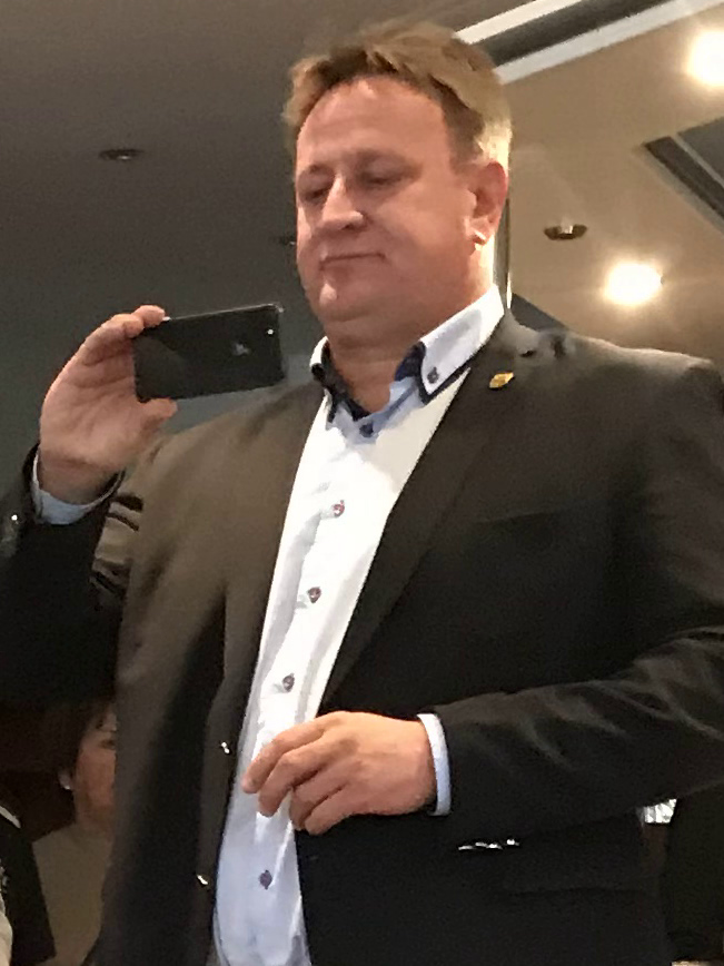 Bürgermeister Schneider bei der Eröffnung der 10. Offenen Senioren-Schachmeisterschaft in Binz.